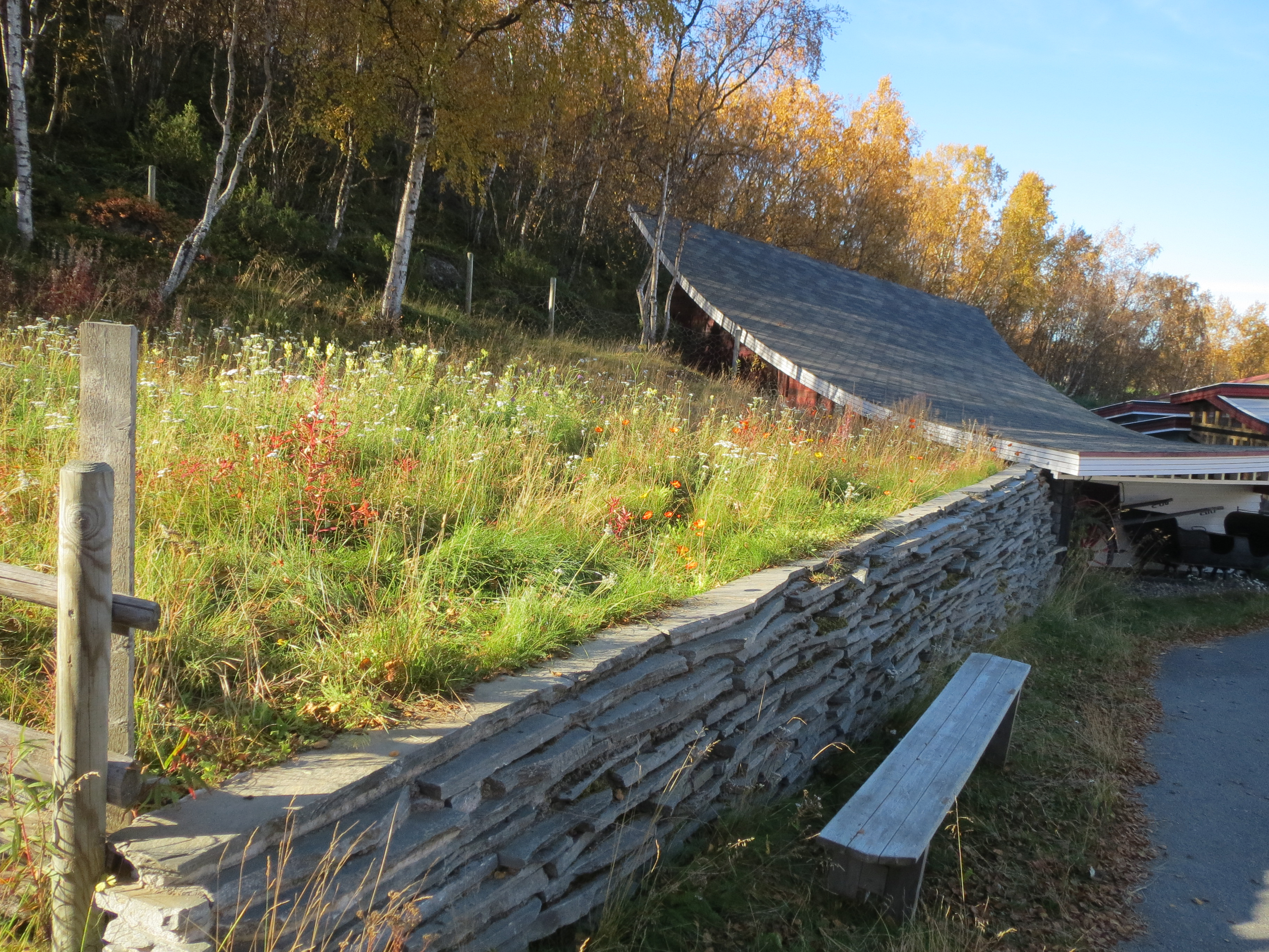 Kukkaketo Gallerian liepeillä, KautokeinoNorway